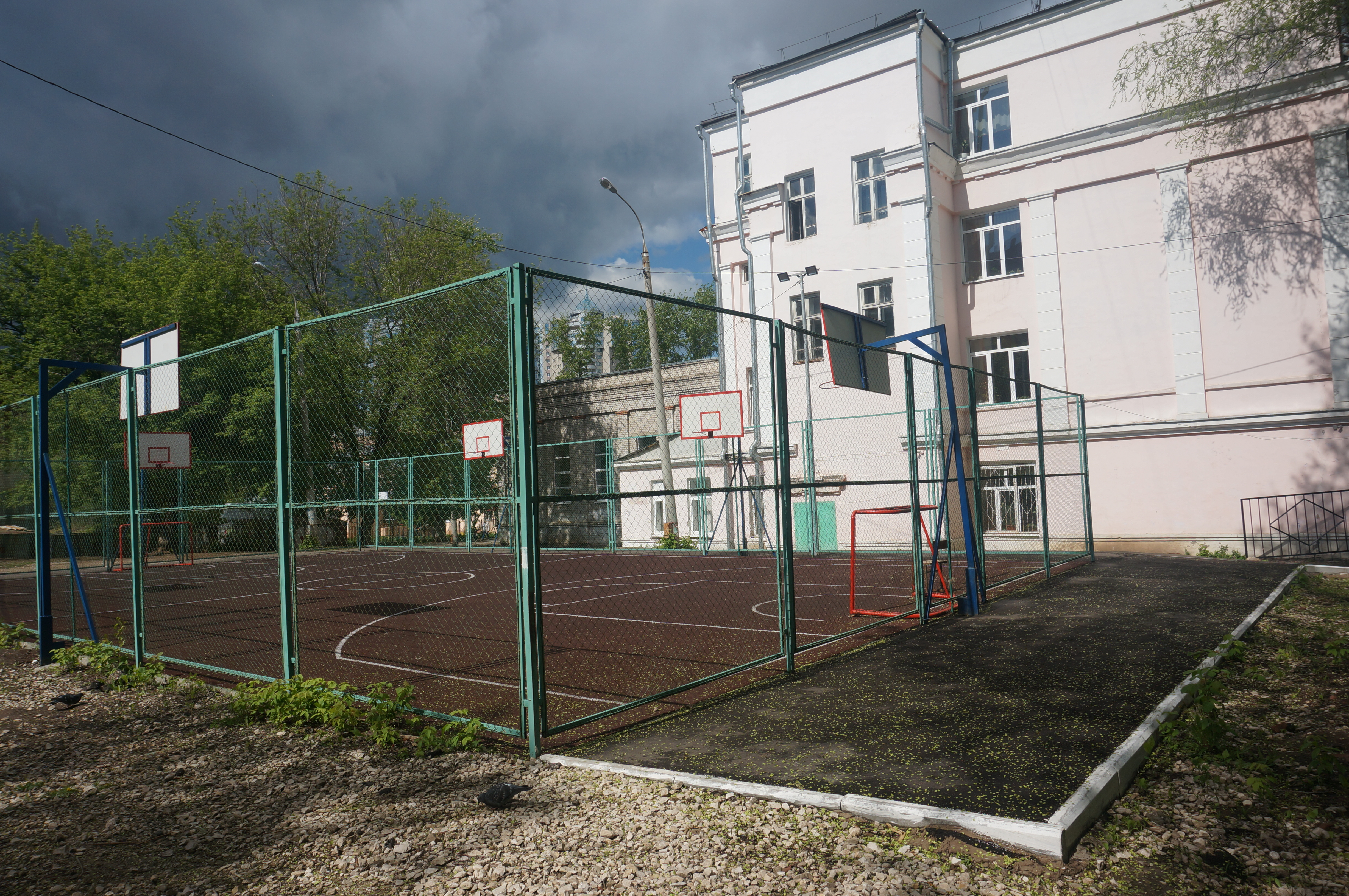 Самарская школа № 16. Школьная спортивная площадка расположена на месте бывшего кладбища Самарского Николаевского мужского монастыря